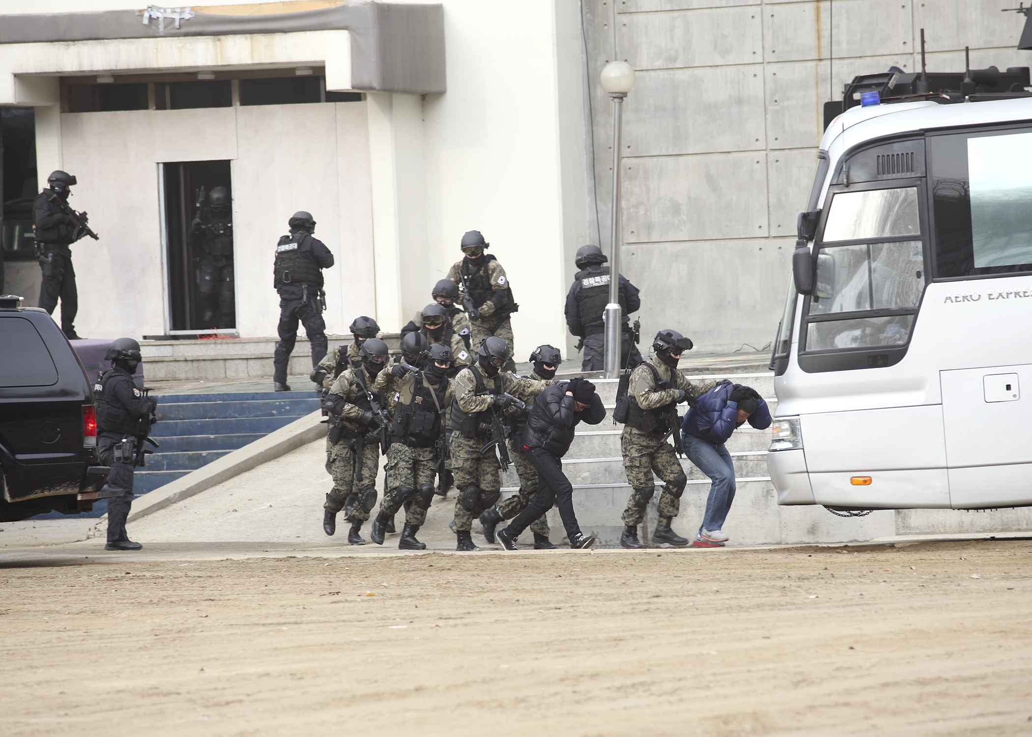 촬영 : 상사 임재전